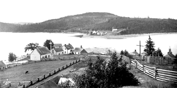 Français cadien: La mission des Oblats près du fort Témiscamingue, en 1887